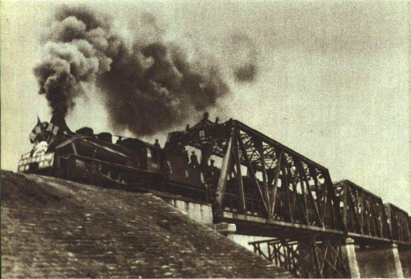 西南成渝铁路沱江大铁桥